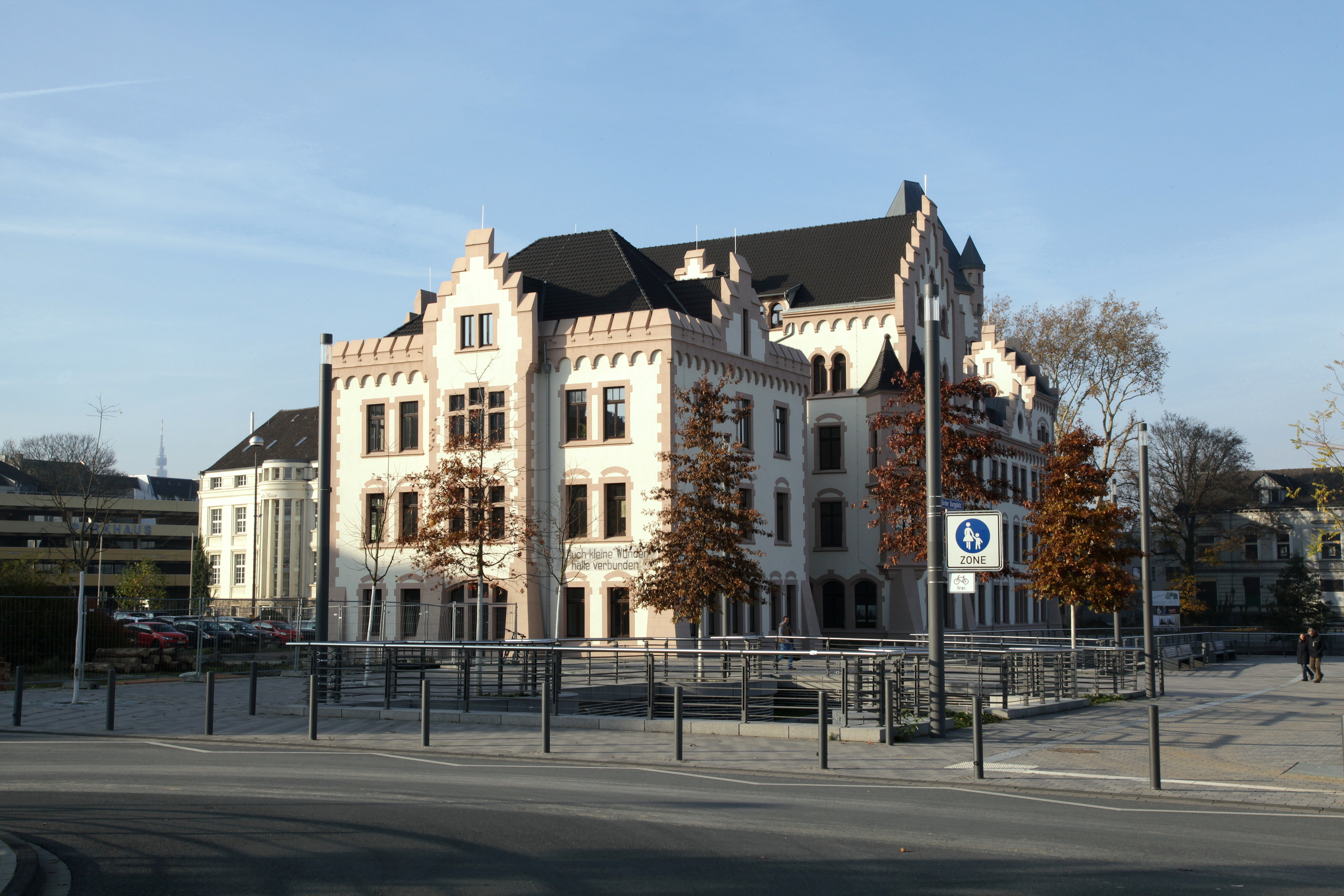 Hörder Burg am Hörder Burgplatz in Dortmund